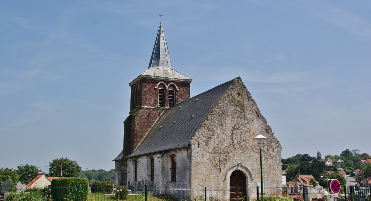 église de style Flamboyant en partie du 12 Em siècle le Chœur du 15 Em siècle une nef de 1779 une tour de 1879 et une cloche classée de 1506 appelée Marie